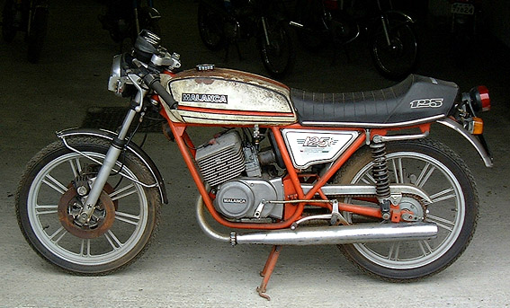 マランカ！ from「見せて」